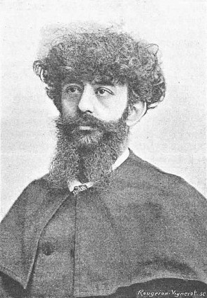 Josephin Peladan par Benque et cie